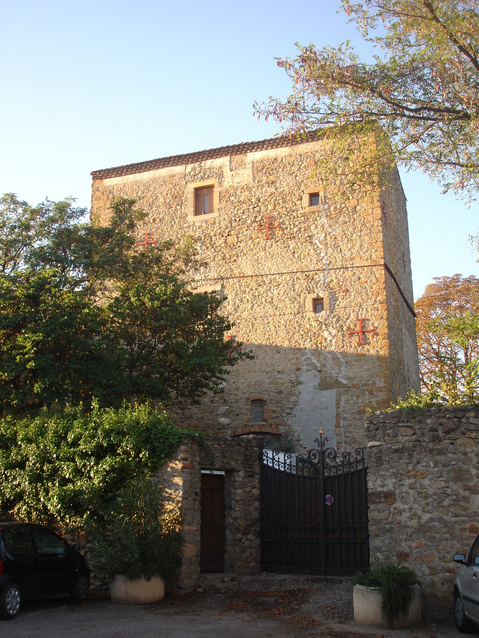 France, Aude (11), Pieusse, Château